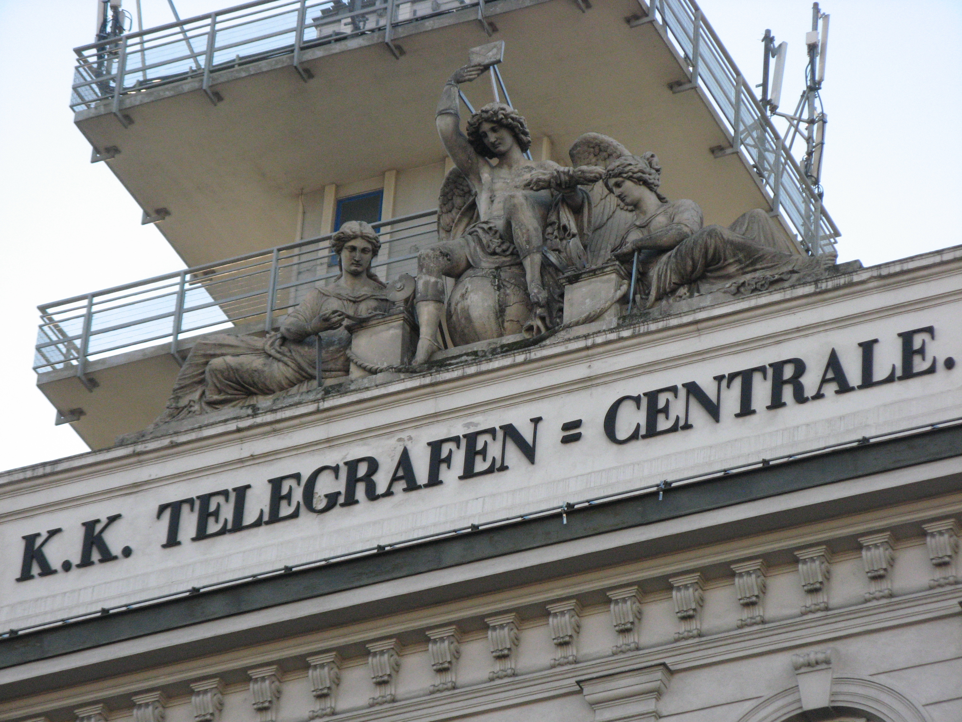 Figurengruppe an der ehemaligen Telegrafenzentrale (1870-73), Börseplatz Nr. 1, Wien-Innere Stadt